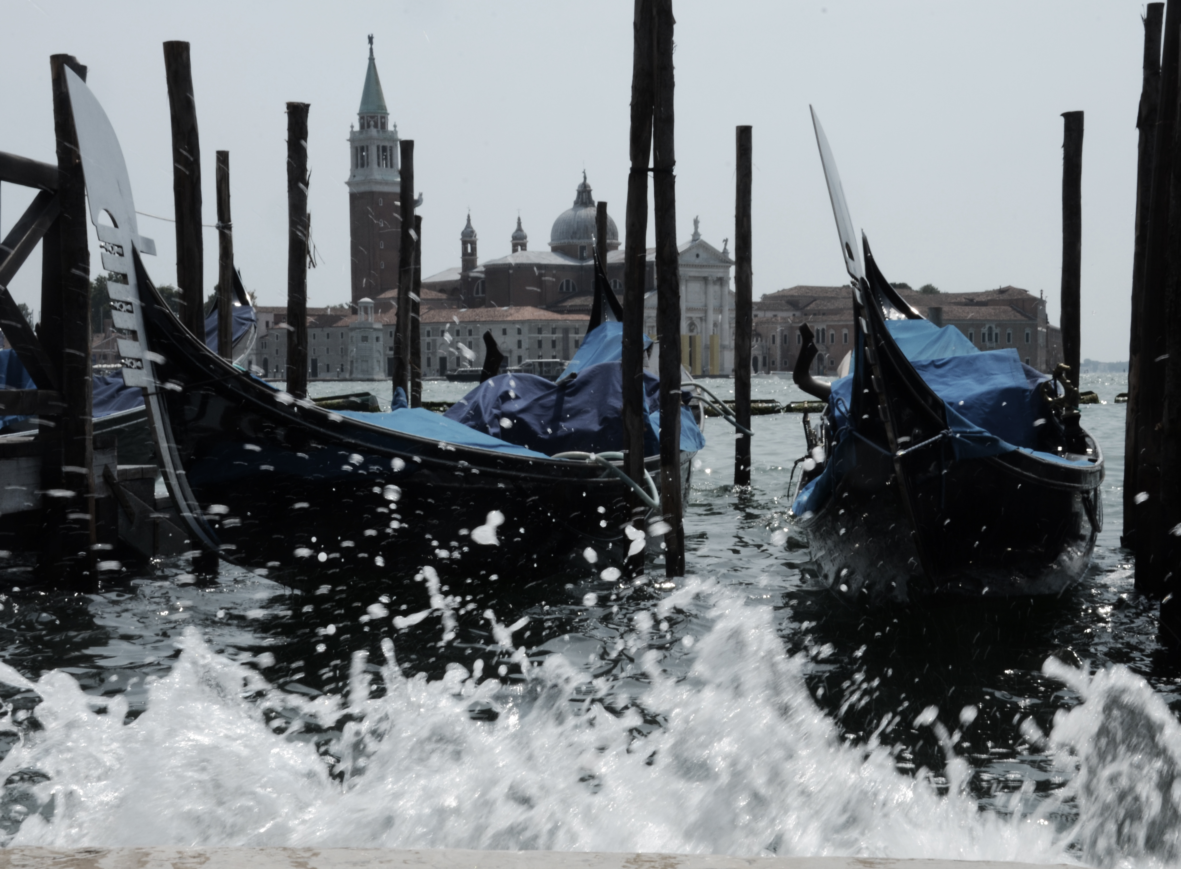 Opspattend water bij de gondelhaven in Venetië nabij San Marco.